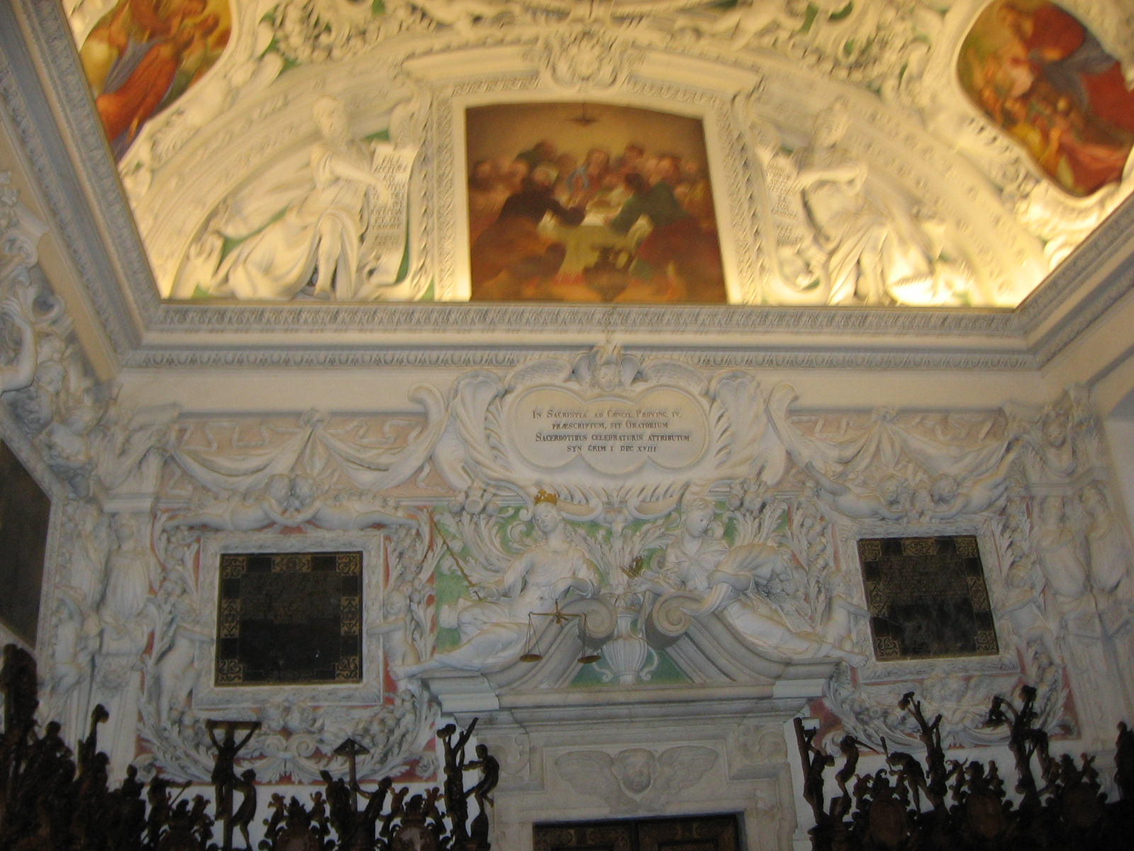 Museo le Sagrestie, Alzano Lombardo, BG (ITALIA)